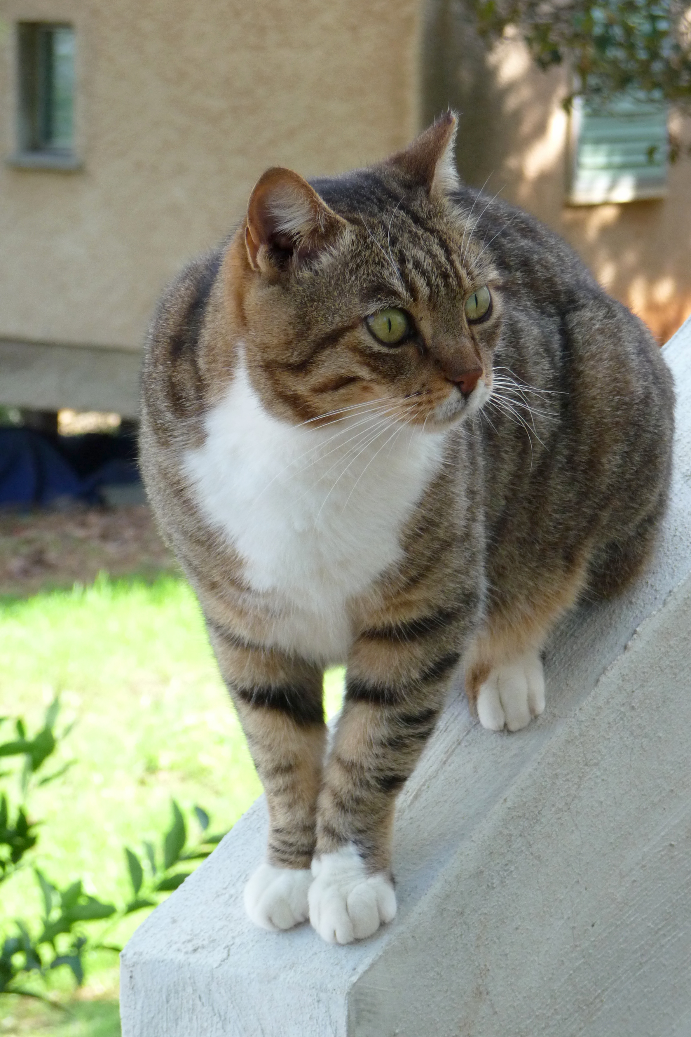 החתולה מיציבוץ מקיבוץ בית אורן